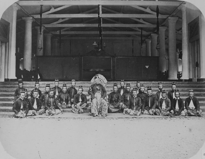 foto. Groepsportret van de regent met lokale bestuurders voor zijn woning